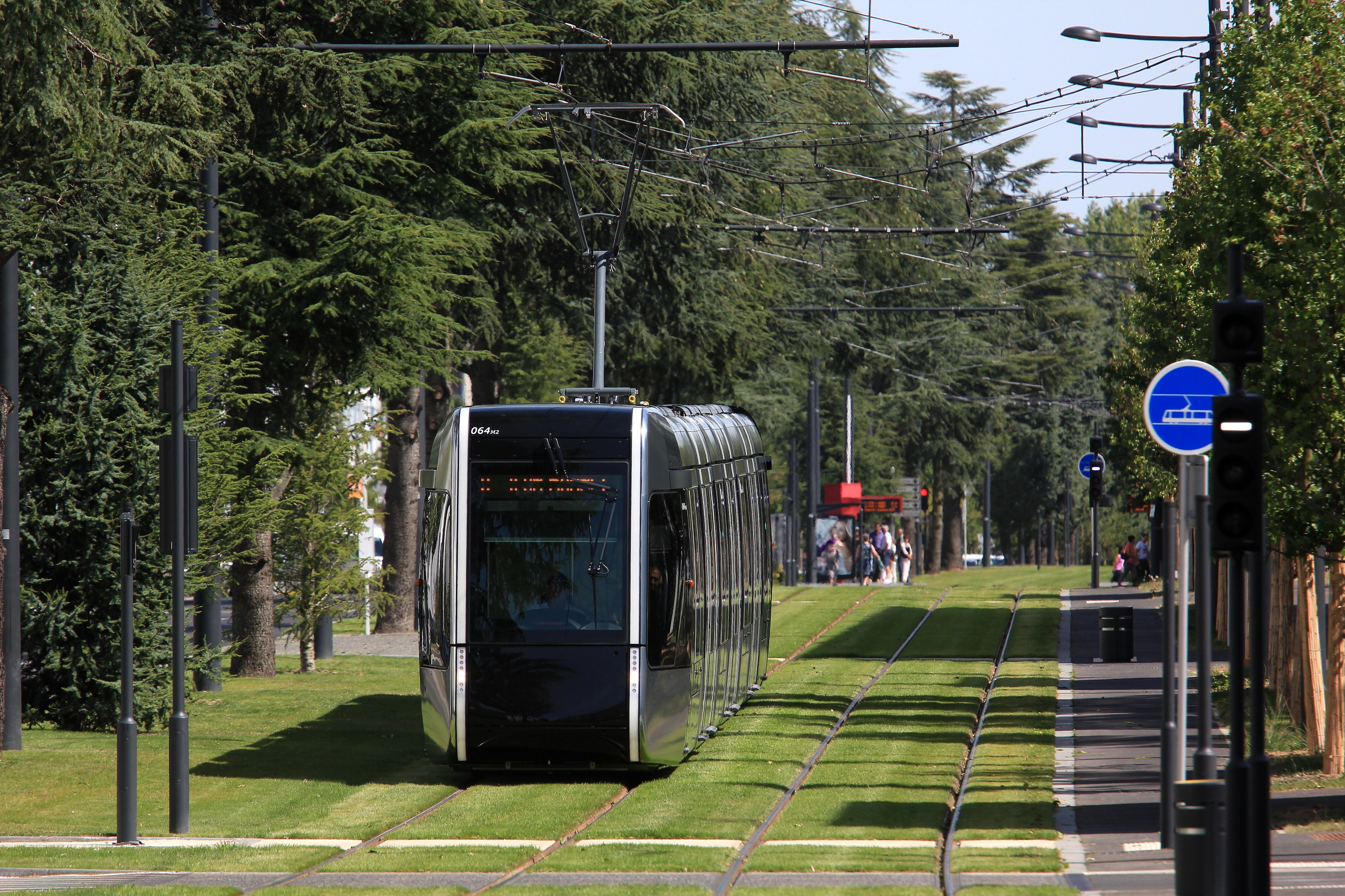 Une rame du tramway de Tours (Citadis n°64) vue entre les arrêts Coppée et Beffroi, depuis Beffroi.